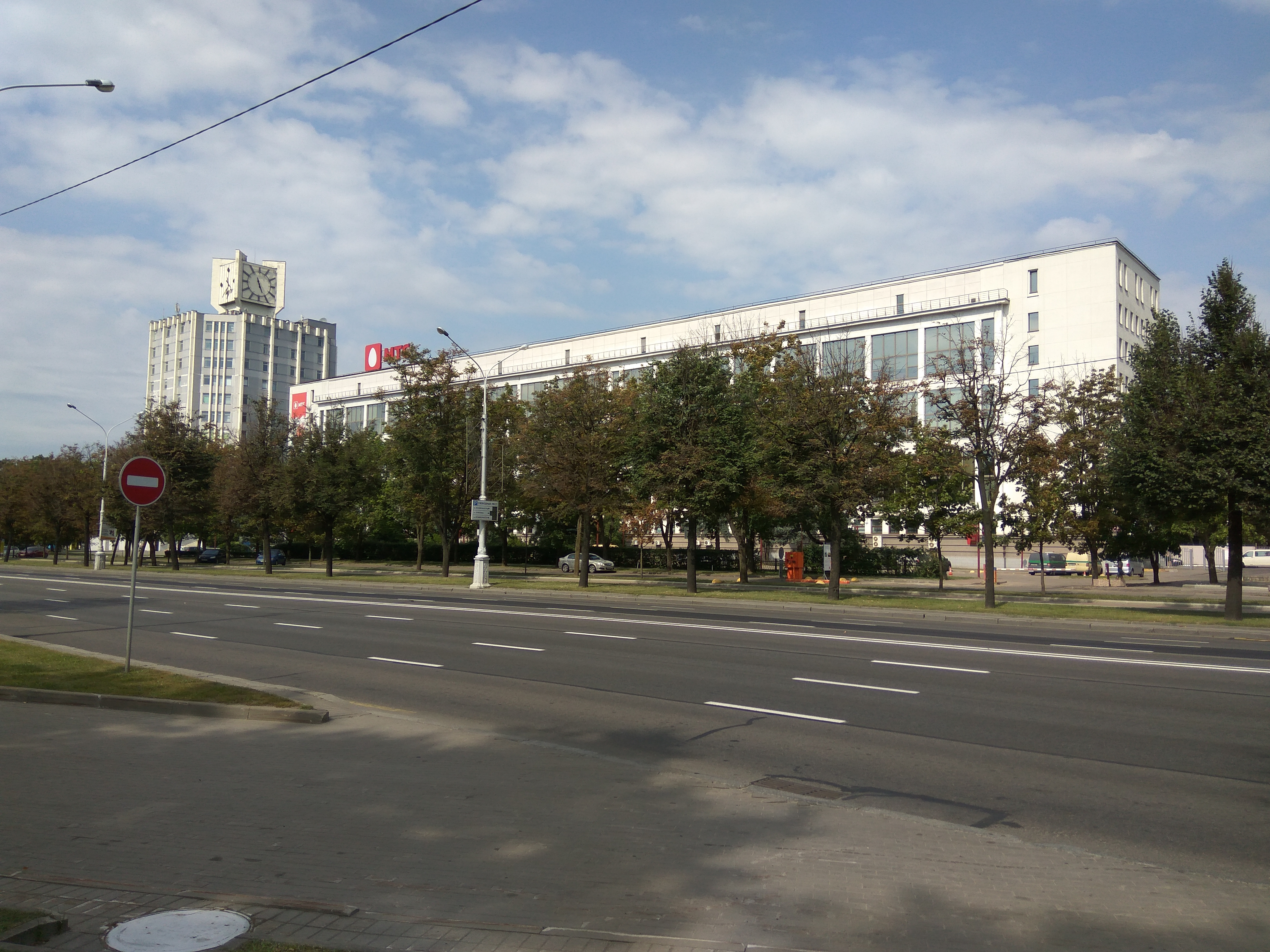 Мінск. Мінскі гадзіннікавы завод